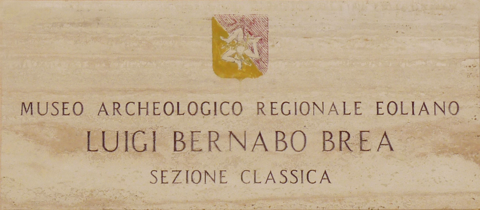 Musée archéologique éolien de Lipari (Sicile). Plaque à l'entrée de la Section Classique.